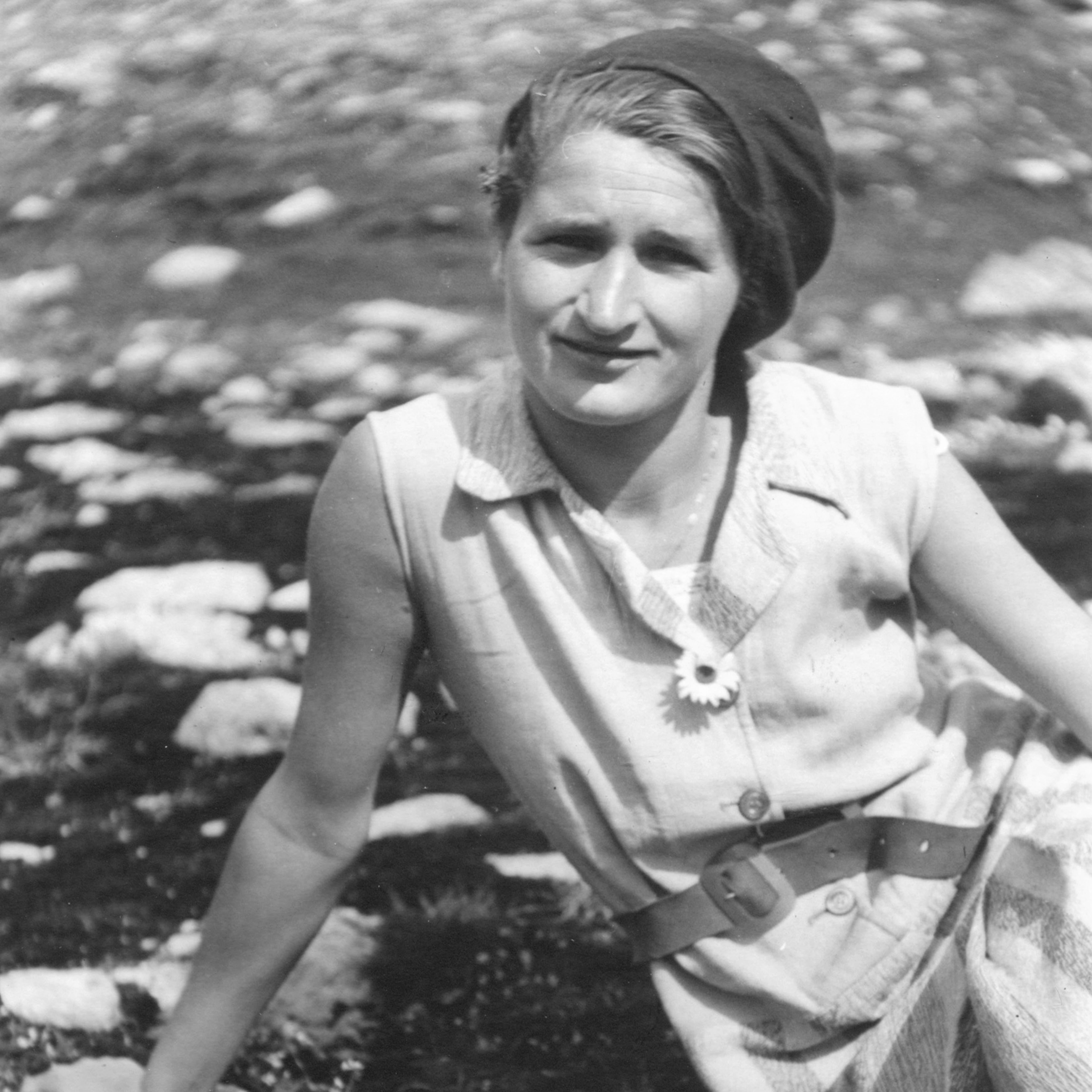 Greti Caprez-Rofler (1906–1994) war 1931 die erste Pfarrerin der Schweiz, die alleinverantwortlich eine Gemeinde (Furna GR) betreute. Das Foto zeigt sie an ihrem 25. Geburtstag, kurz vor Antritt des Amtes.